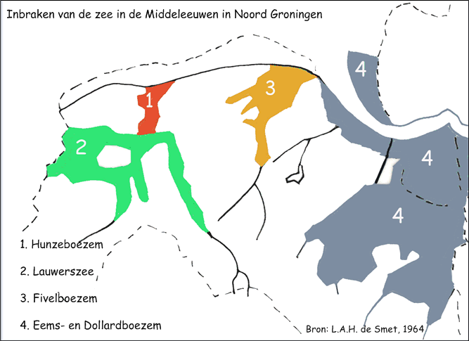 Zelf getekende kaart op basis van een kaart uit L.A.H. de Smet, De vorming van de kust van Groningen in verband met de geologisch-bodemkundige opbouw, Groningse Volksalmanak, Erven B. van der Kamp, Groningen, 1964, p.163